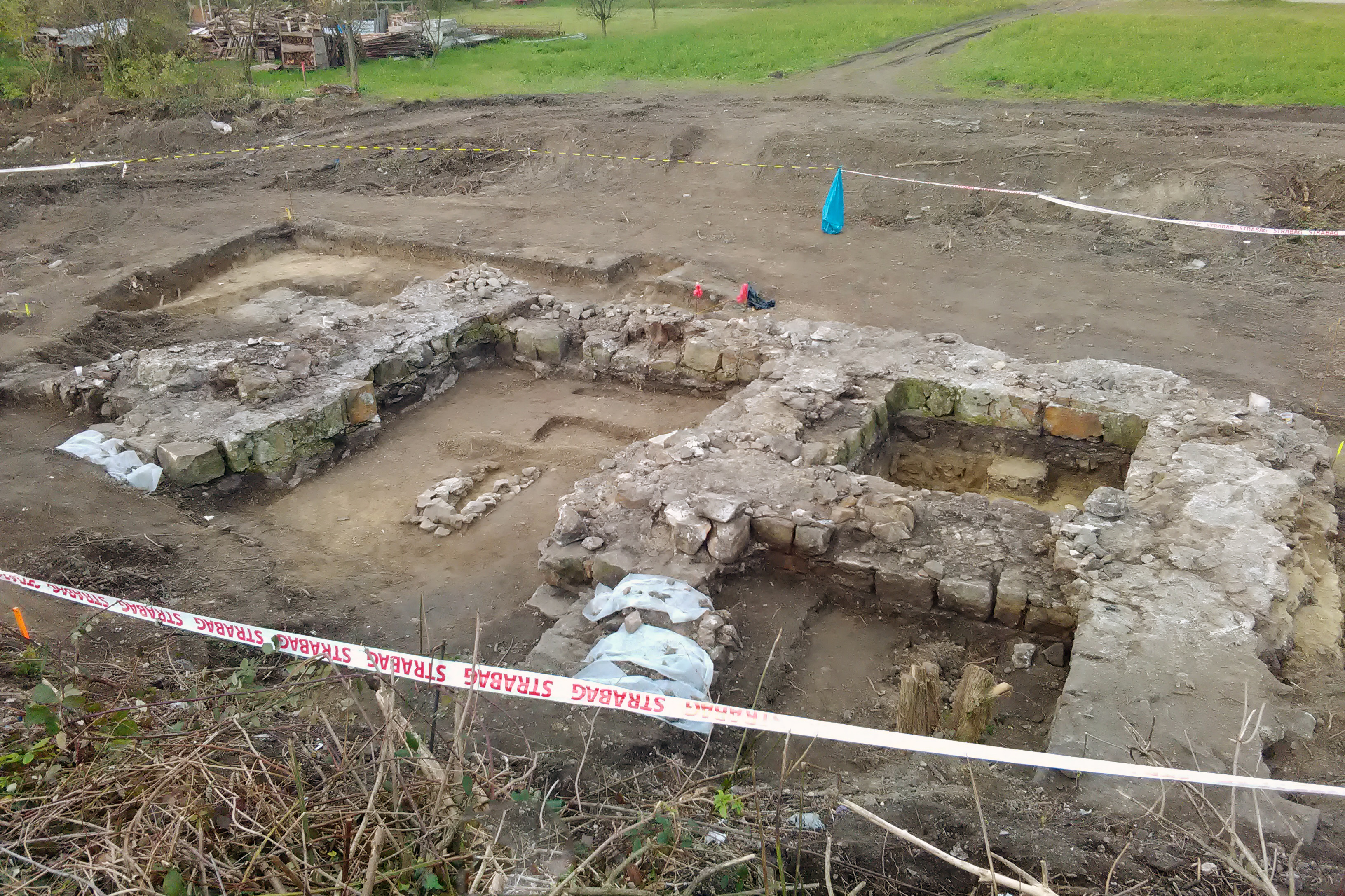 A középkori Kovácsi falu temploma - 2016-os feltárás